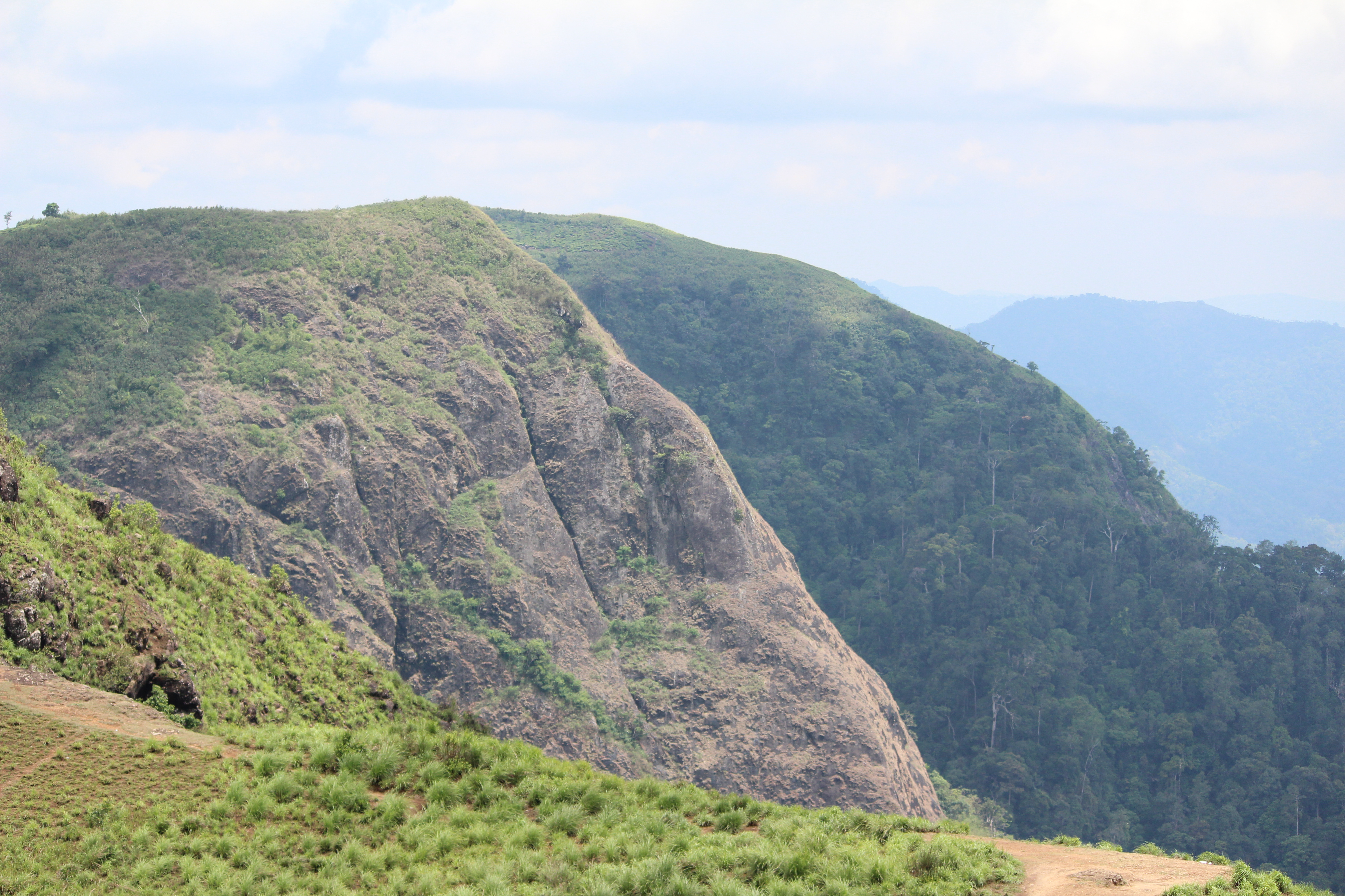 പരുന്തും പാറ